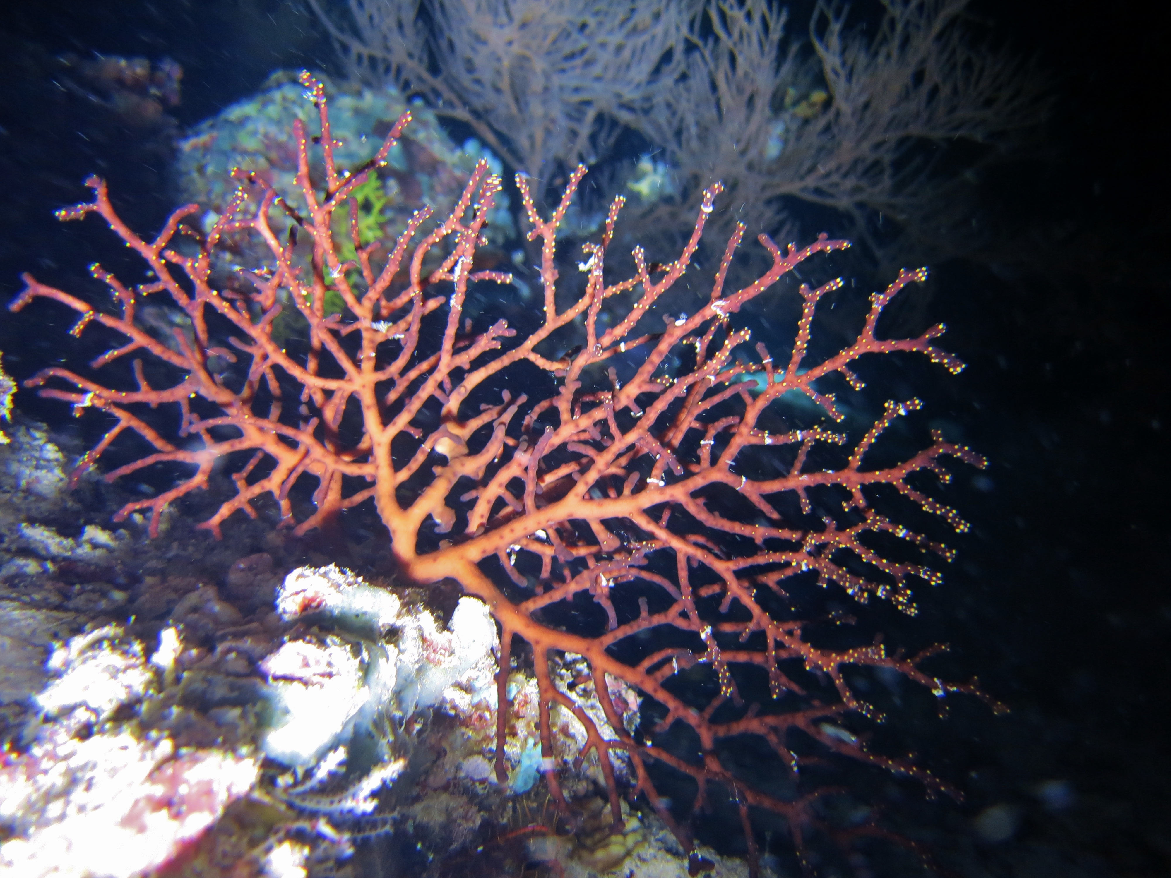 Une colonie de corail Siphonogorgia aux Maldives (atoll de Baa).